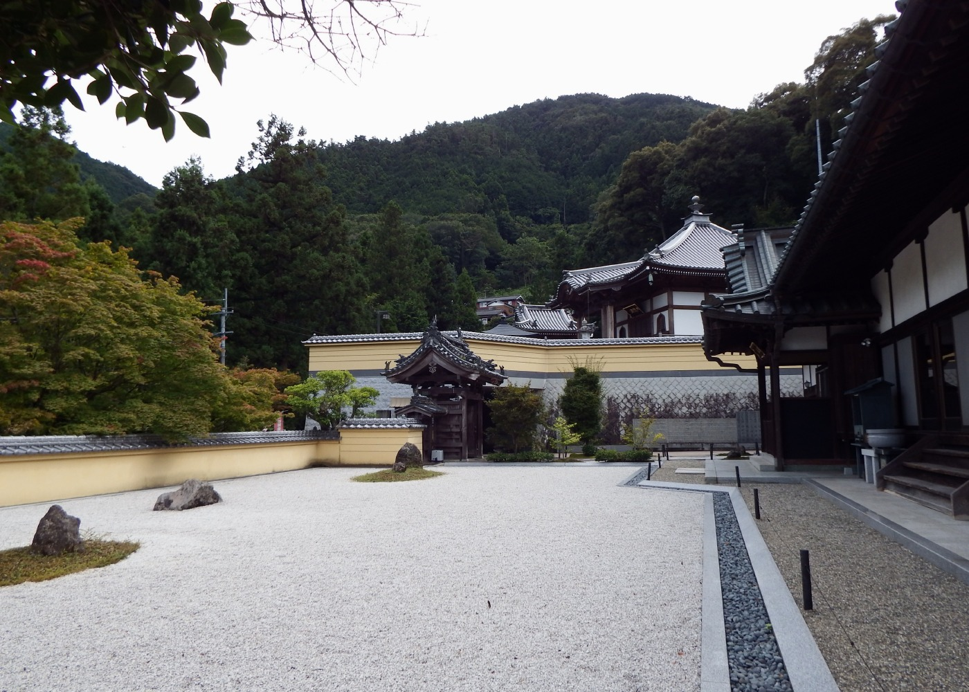 蓮華寺の全景